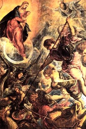 HöllensturzGemälde von Tintoretto, 1592